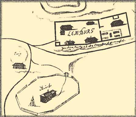 Üleval paremal on kujutatud linnuse kivist ringmüüre ja linnuseõues seisvaid puitehitisi. Plaan XVII sajandist.